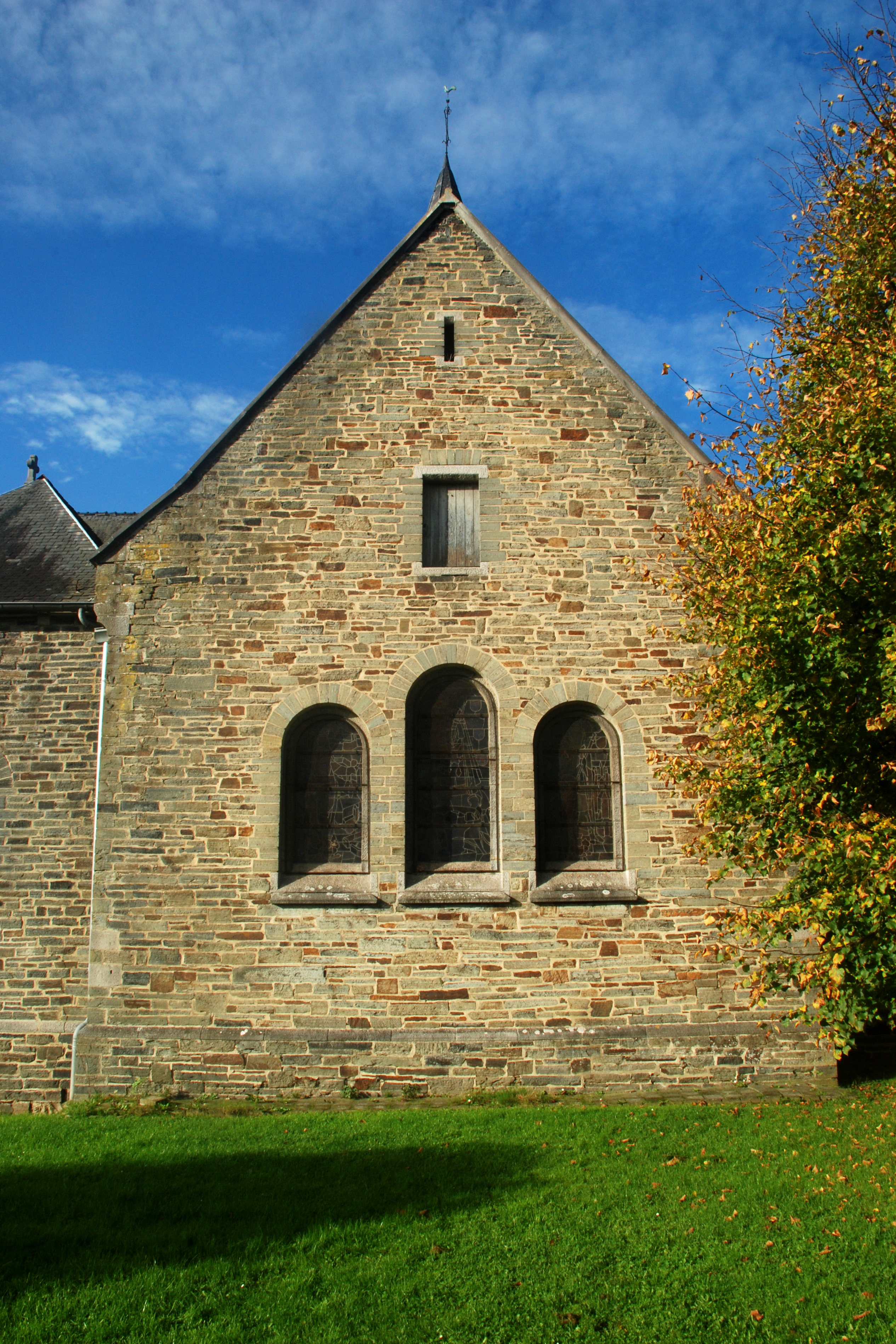 Belgique - Brabant wallon - Villers-la-Ville - Église Notre-Dame de la Visitation